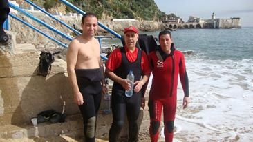 الحماية المدنية الجزائرية فرقة الغوص لميناء سكيكدة